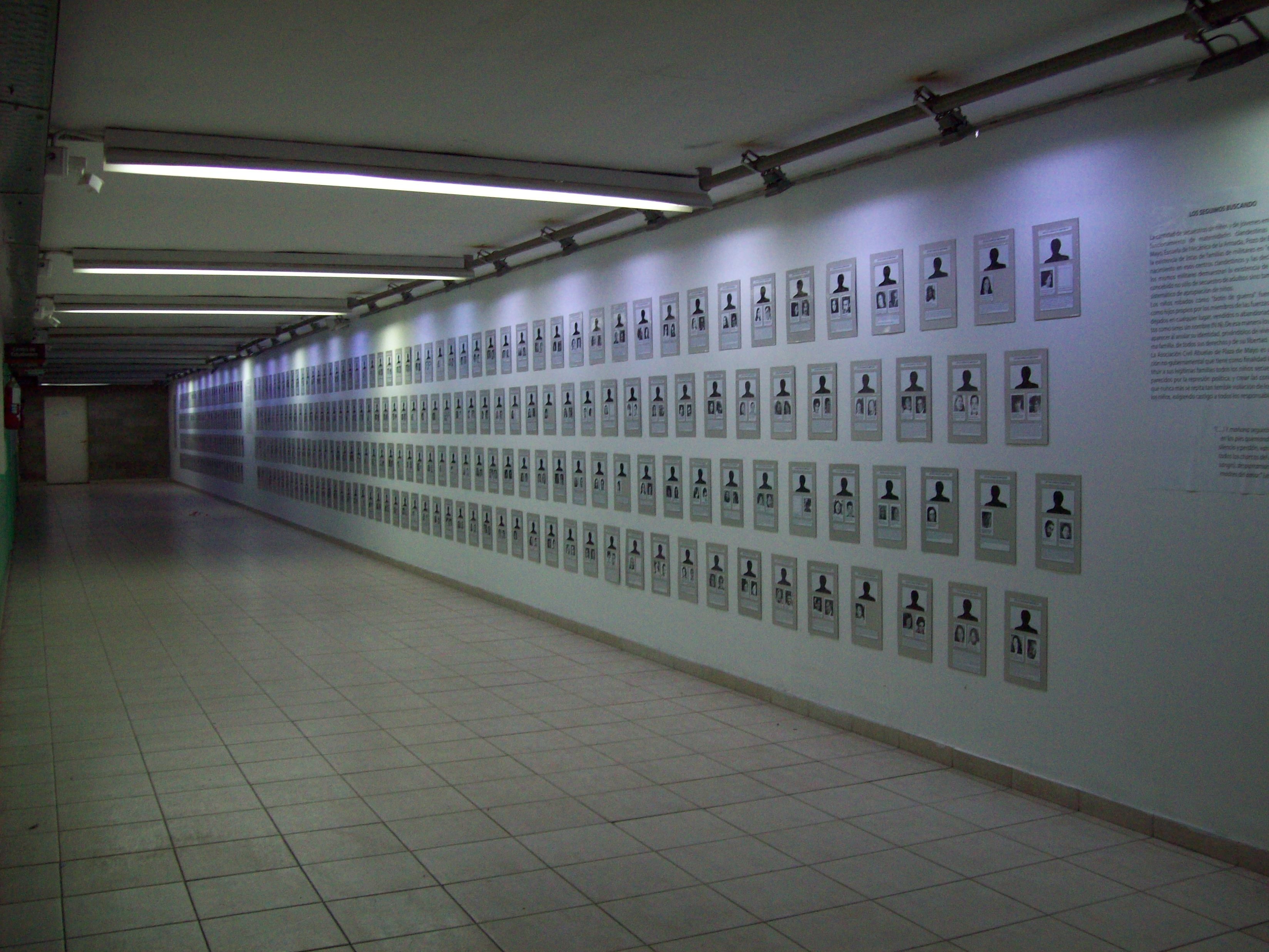 Pasillo de la memoria en homenaje a los neonatos secuestrados durante la dictadura cívico militar que gobernó a la Argentina durante 1976 a 1983, en la Universidad Tecnológica Nacional (UTN) Facultad Regional de Avellaneda, Villa Dominico, Argentina.